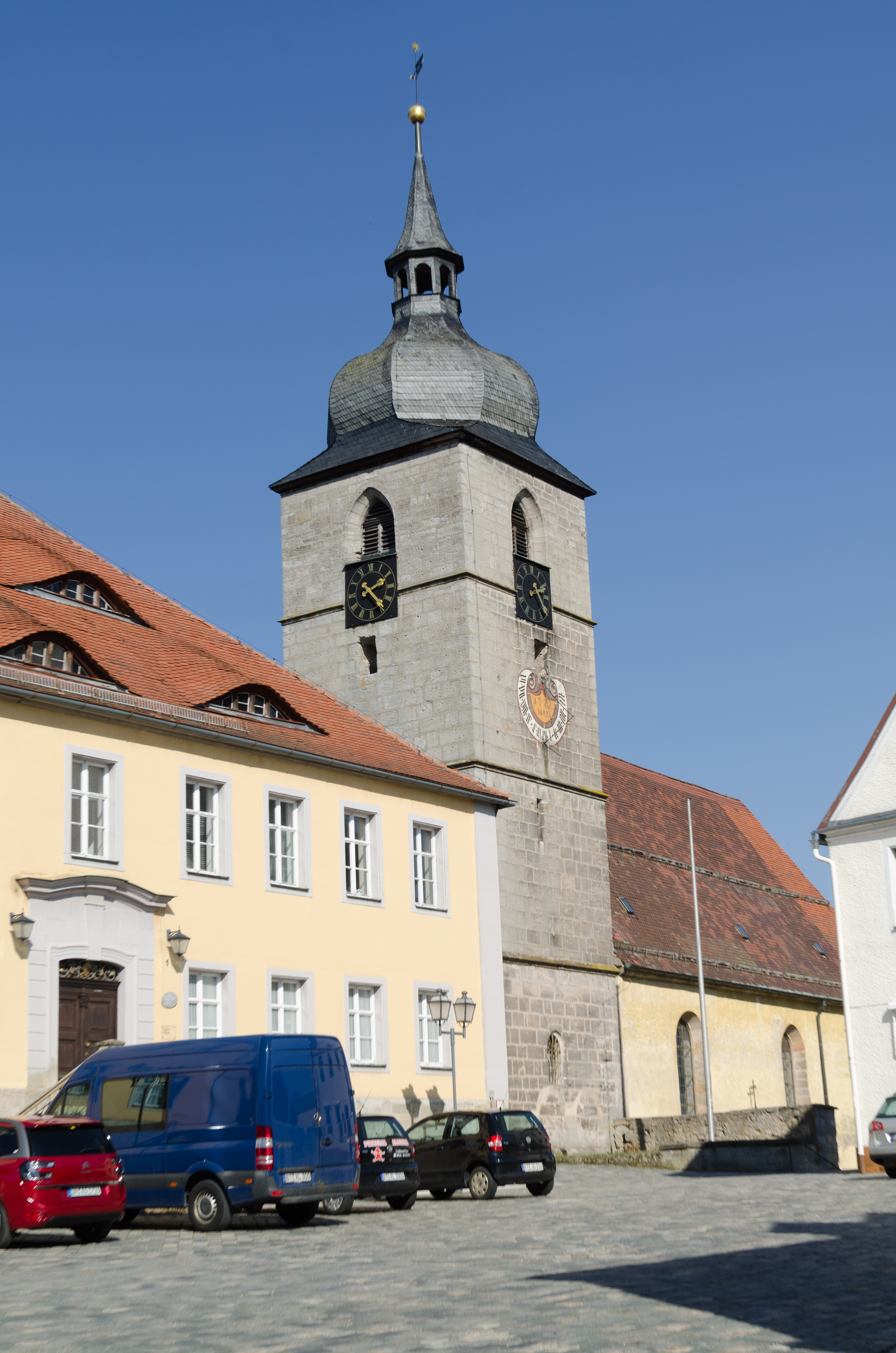 Creussen, Pfarrer-Will-Platz 1, Ev. Pfarrkirche